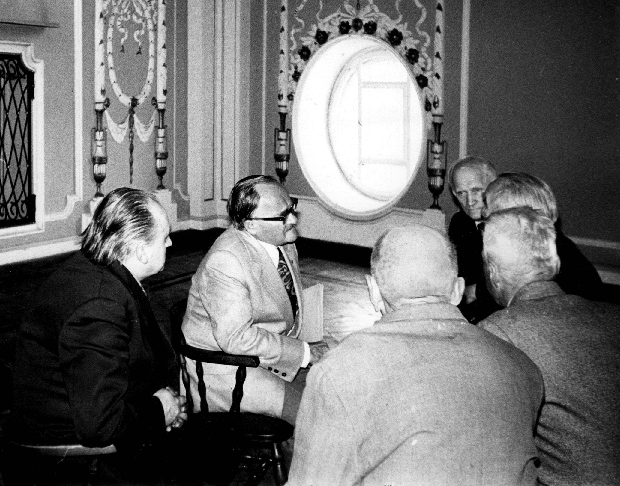 Mieczysław Woźniakowski (drugi z lewej) i Zdzisław Konicki (pierwszy z lewej) 1976 fot M Z Wojalski 7349 w MHMŁ